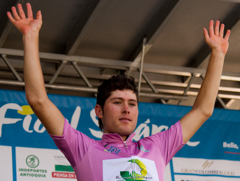 Et.4 Vuelta Marco Fidel Suárez 2016 Sábado 4 de junio de 2016. Cronoescalada 26,3 Kms entre Bello y San Pedro